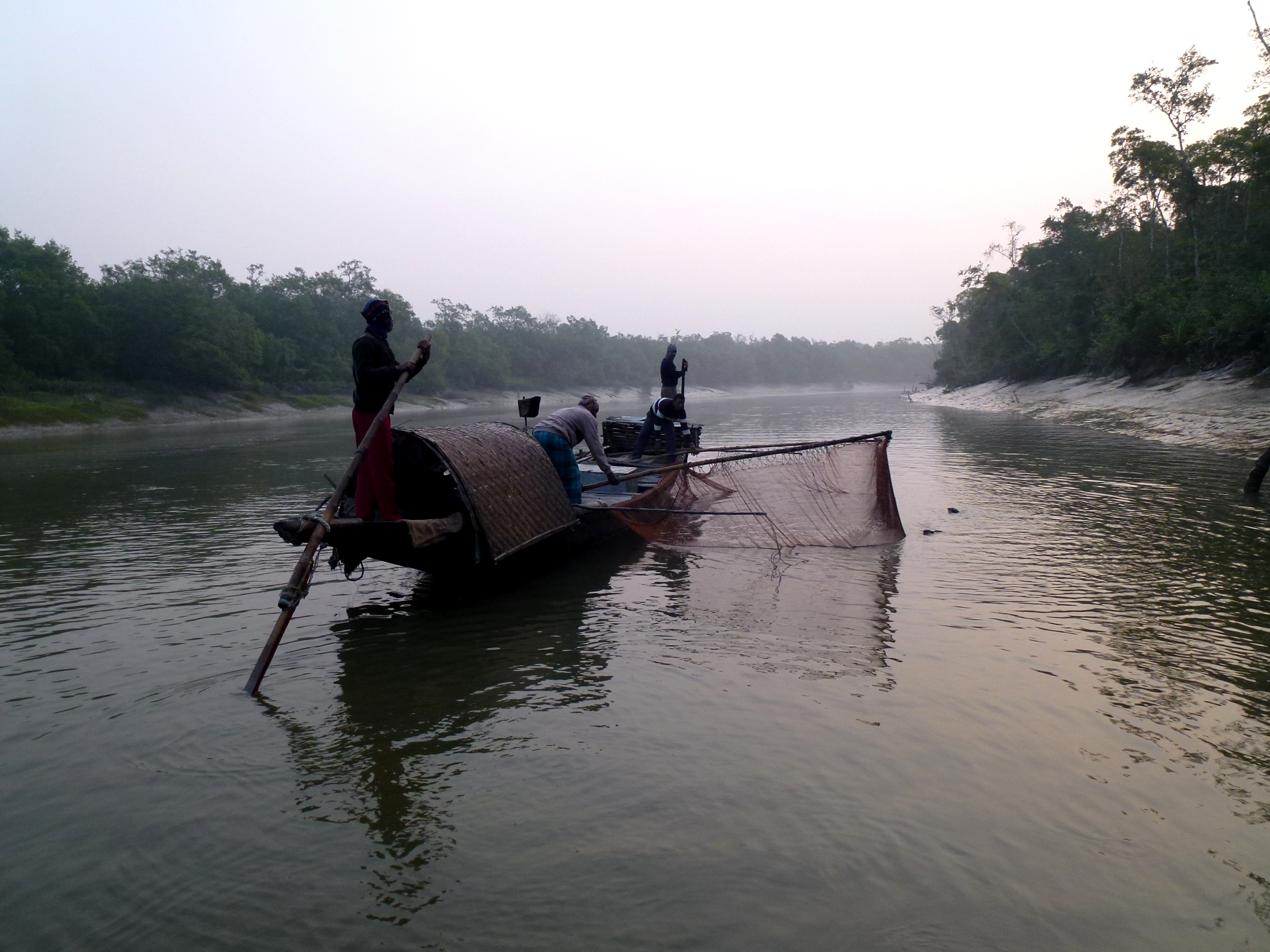 Otter Fishermen Harbaria Sundarban National Park Bangladesh